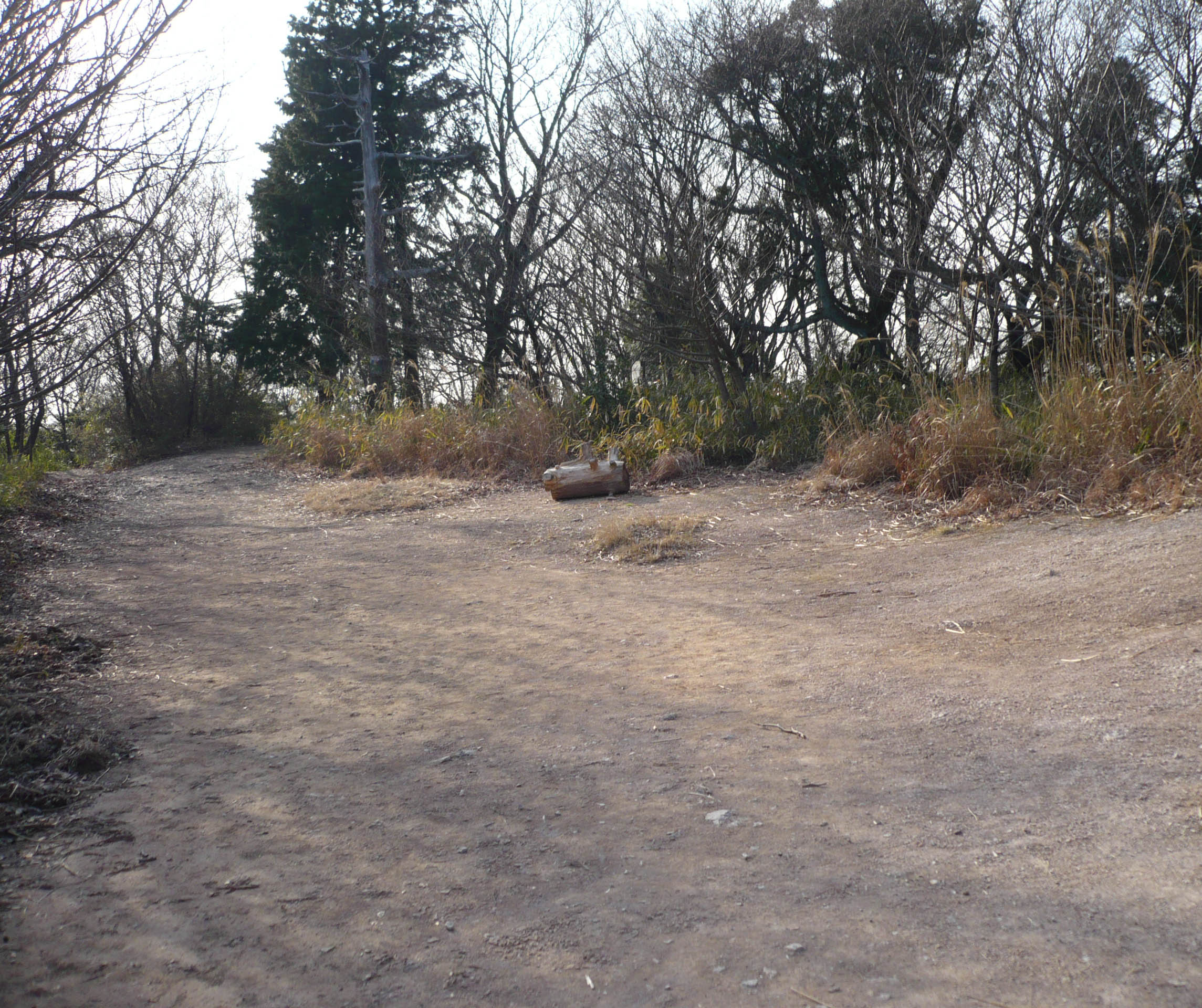 雄岳の山頂部